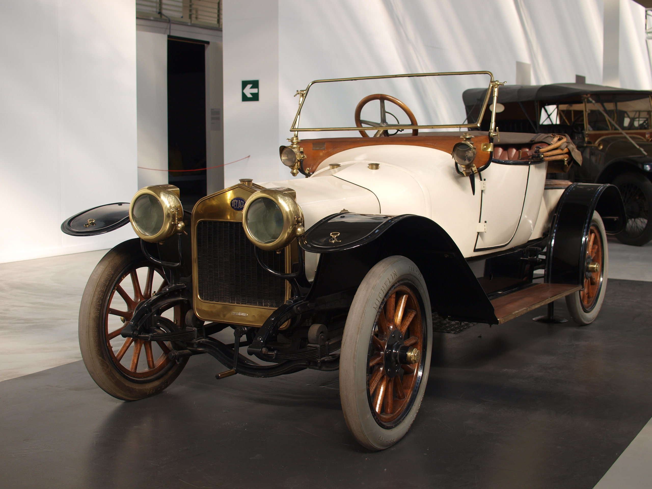 L'evoluzione dell'automobile Delage AB-8 - France 1913